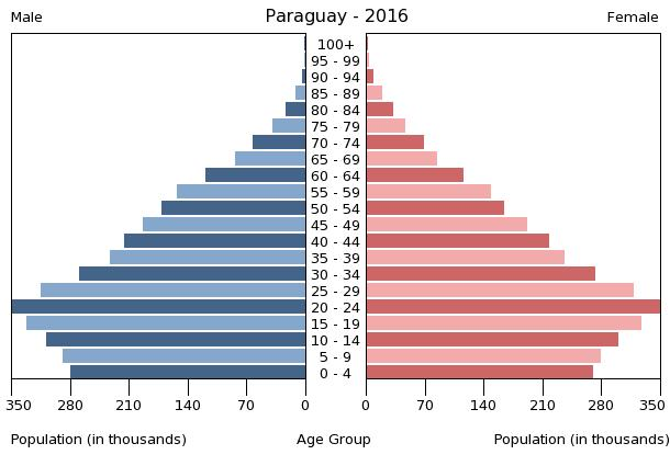 A population pyramid illustrates the age and sex structure of a country's population and may provide insights about political and social stability, as well as economic development. The population is distributed along the horizontal axis, with males shown on the left and females on the right. The male and female populations are broken down into 5-year age groups represented as horizontal bars along the vertical axis, with the youngest age groups at the bottom and the oldest at the top. The shape of the population pyramid gradually evolves over time based on fertility, mortality, and international migration trends.